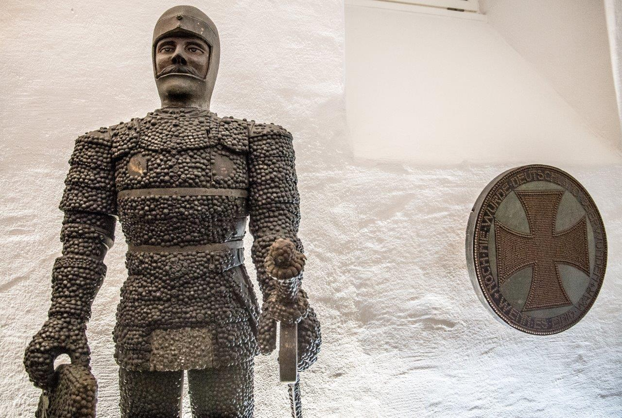 Holzritter im Ausstellungsbereich zum Ersten Weltkrieg. Die eingeschlagenen Nägel dokumentieren Geld-Spenden. © Historisches Museum Saar, Birgit Pfeifer